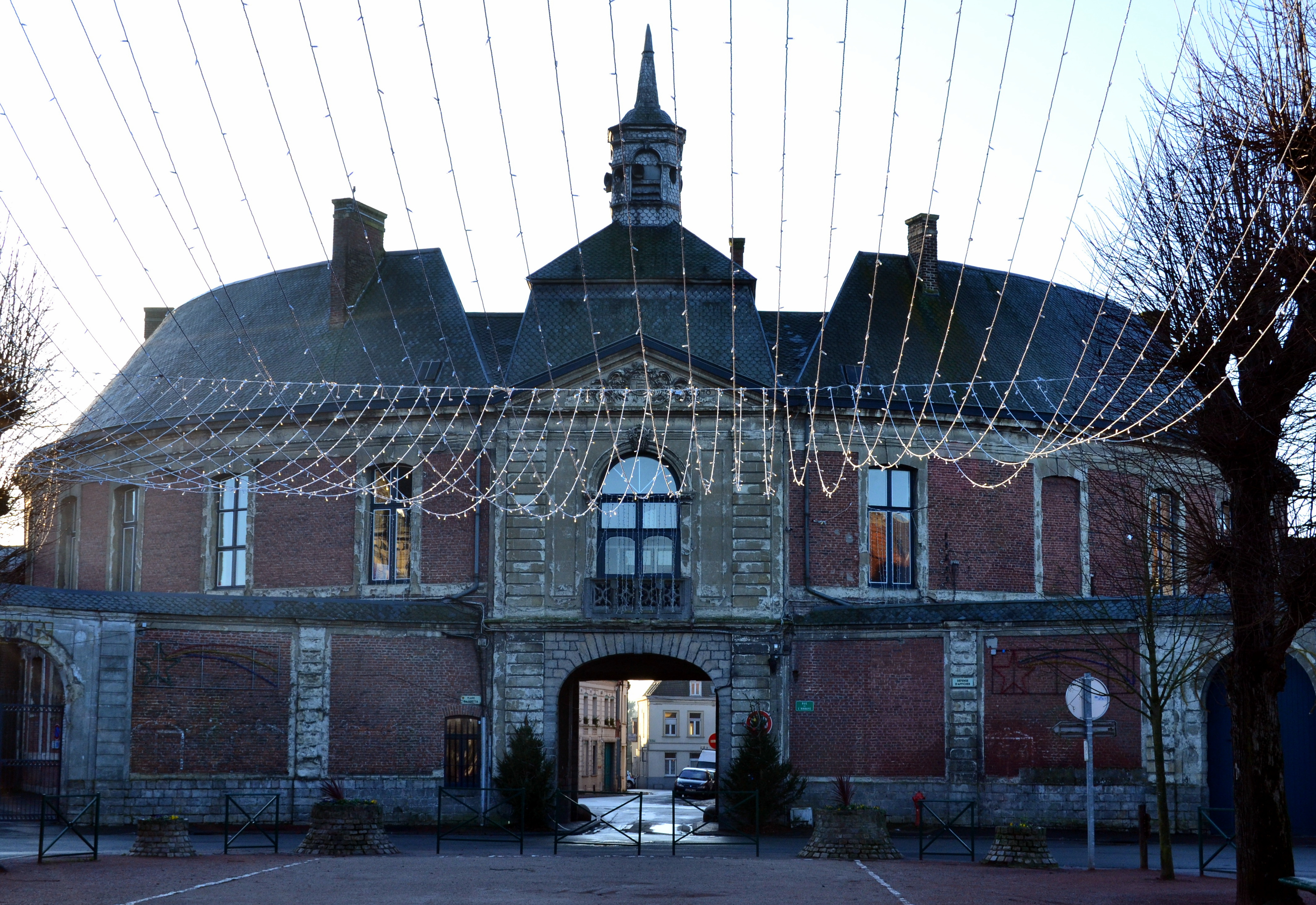 Abbaye de Marchiennes - entrée pricipale